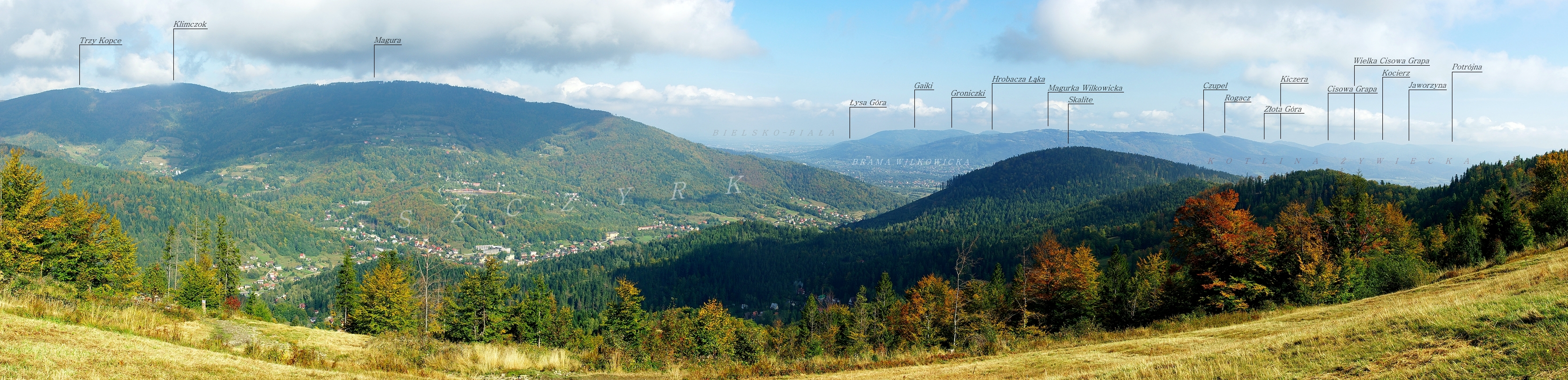 Panorama z Jaworzyny w kierunku północno-wschodnim